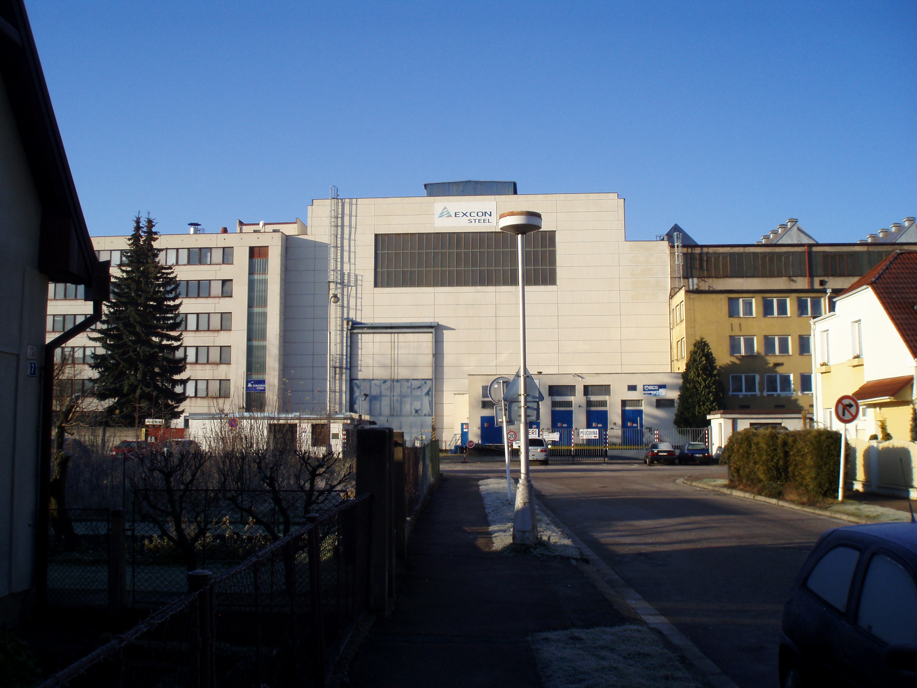 EXCON Steel, později ZVU strojírny